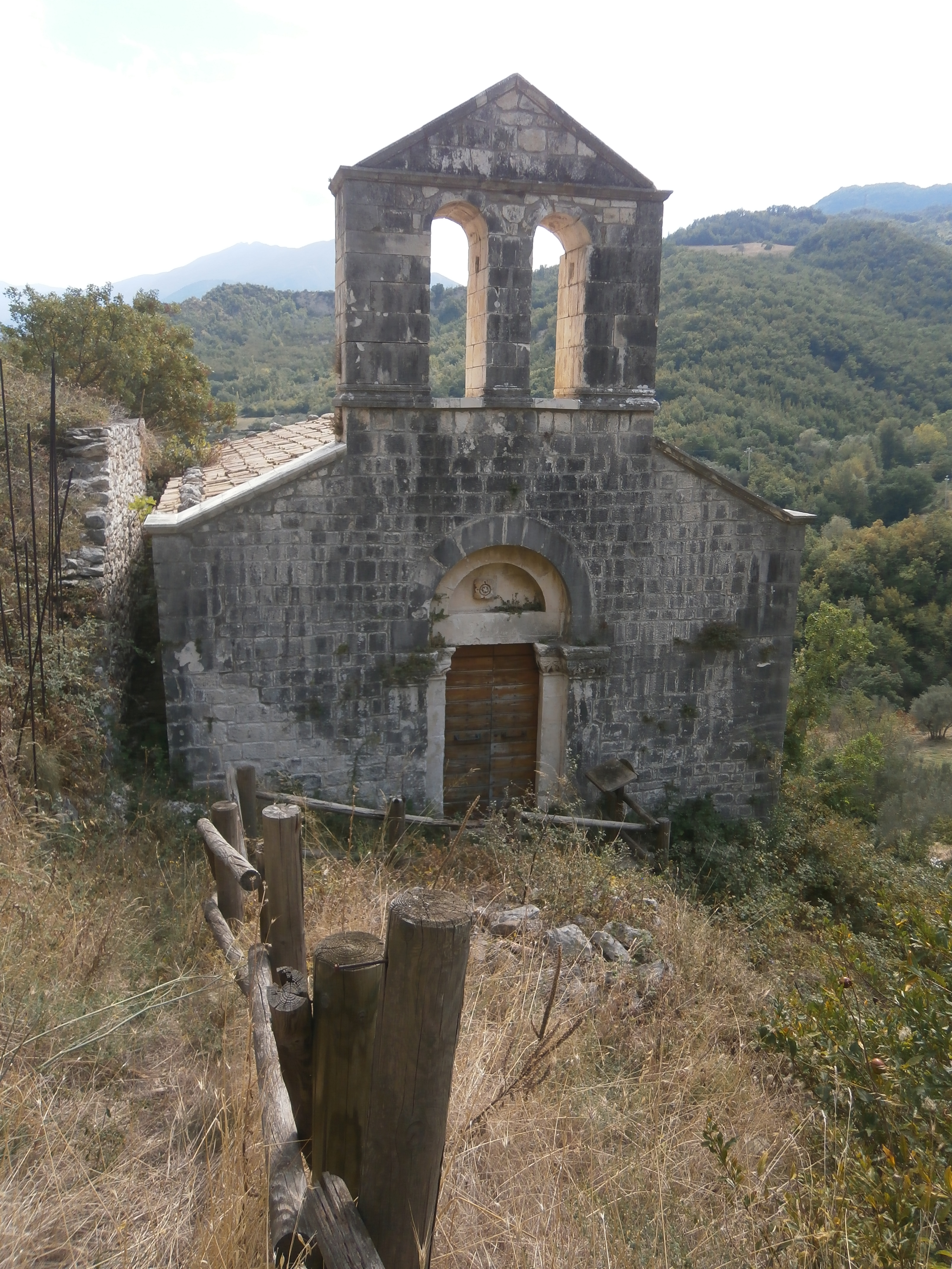 Scorci dell'antico paese abbandonato - Chiesa di San Nicola